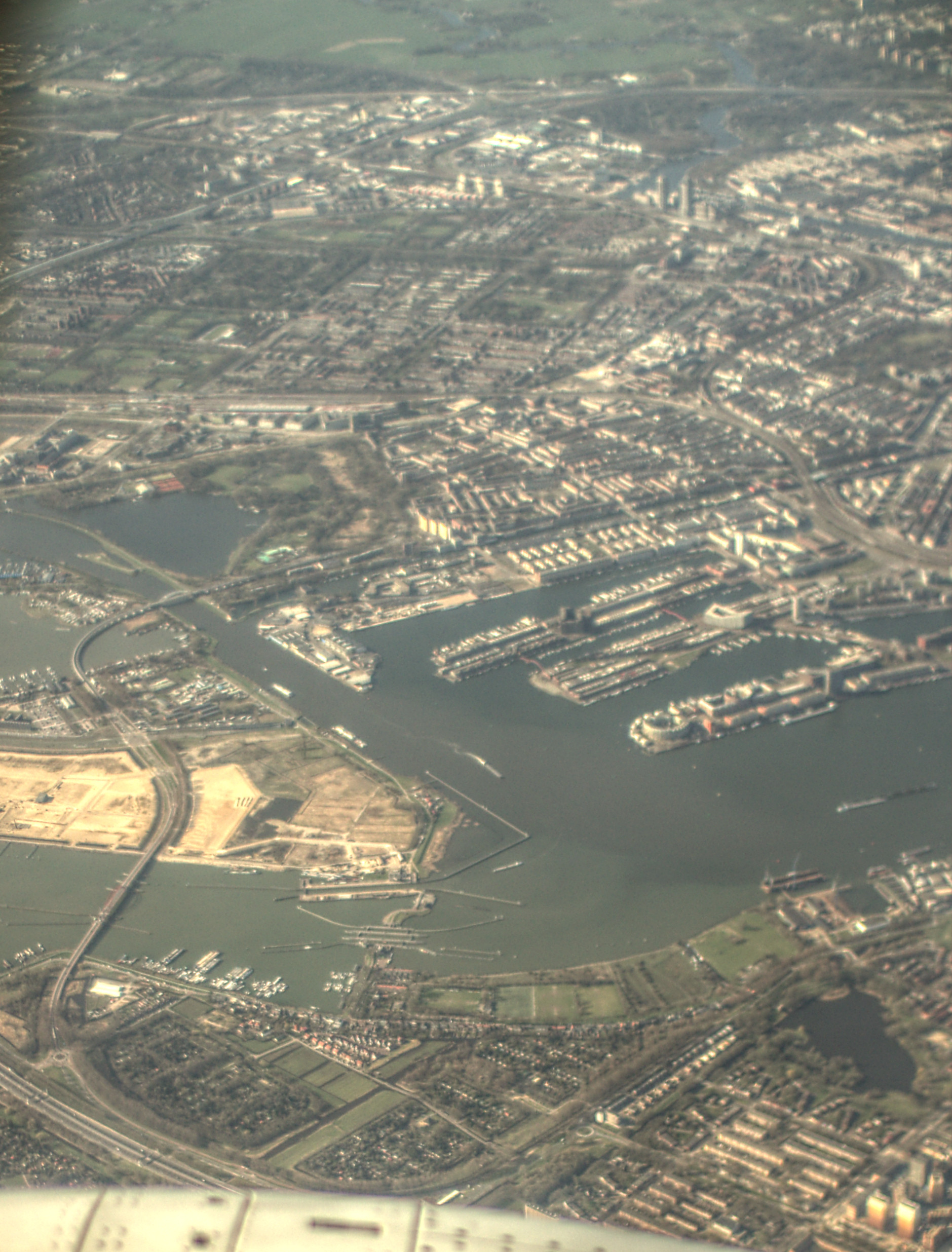 Uitzicht op Zeeburg en de Zuiderzeeeweg naar het westen. April 2013